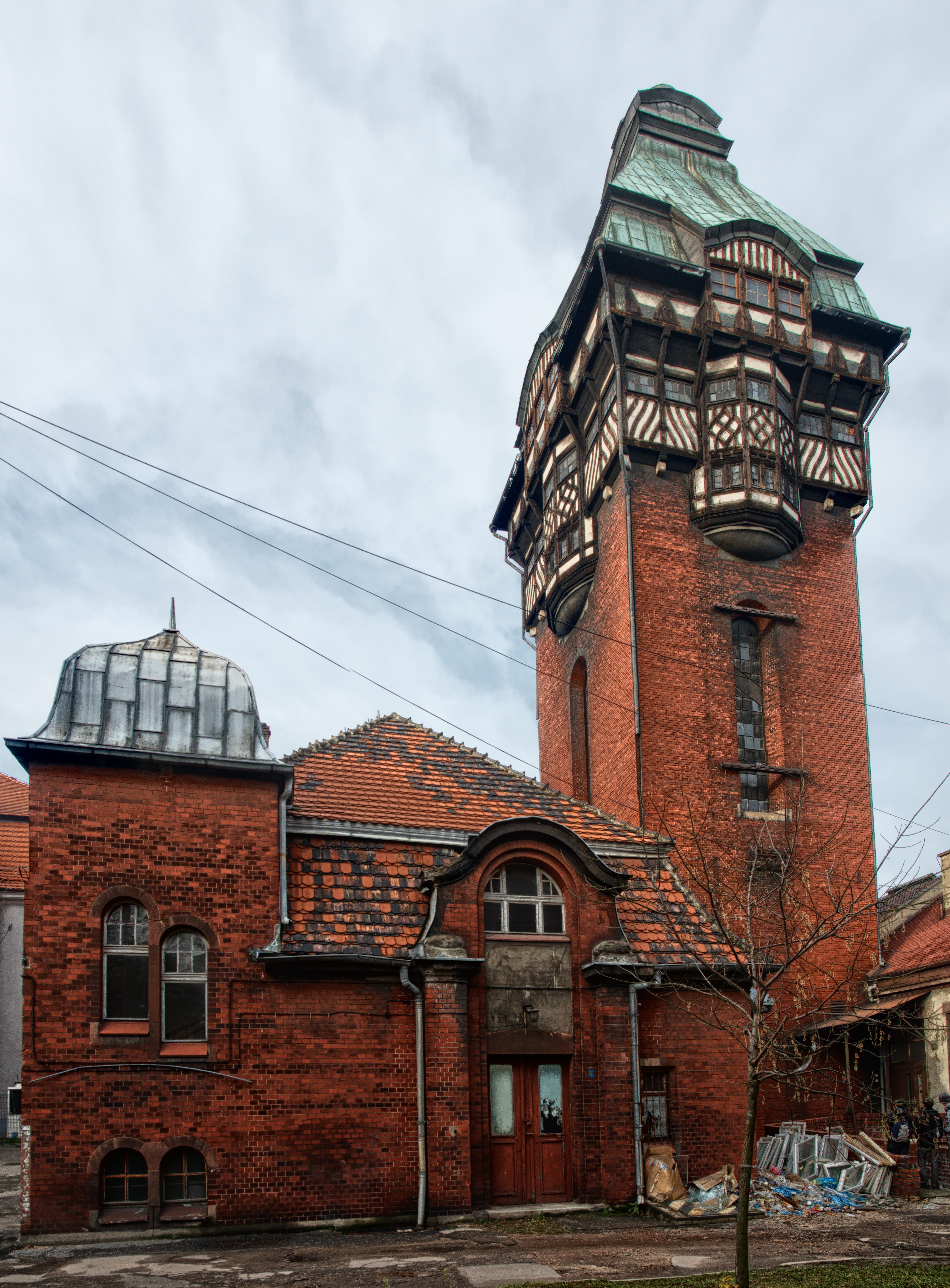 Zabrze, wieża kominowa i ciśnień, 1904